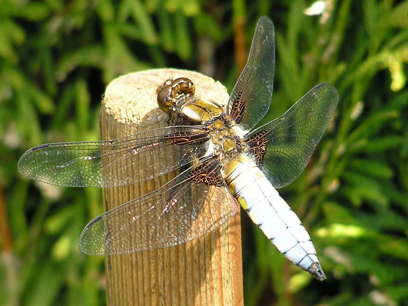 Eine Libelle. Die Art ist ein Plattbauch. Eigenes Foto.